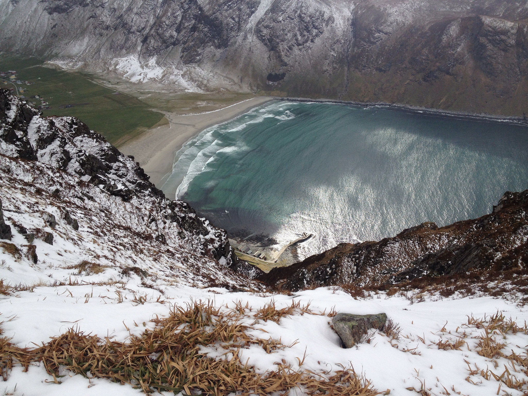 Hoddevik